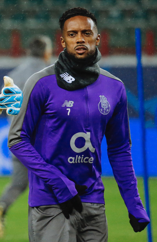 Икер Касильяс вместе с «Порту» готовится к матчу с «Локомотивом»